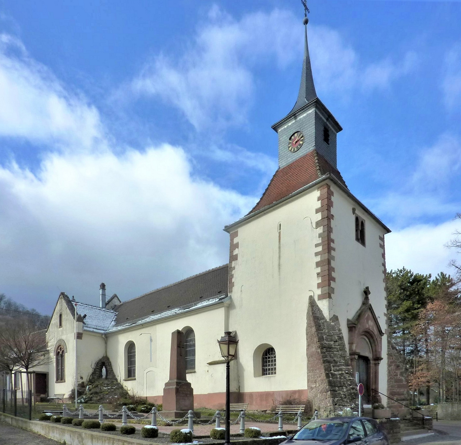 Église Saint-Nabor de Saint-Nabor